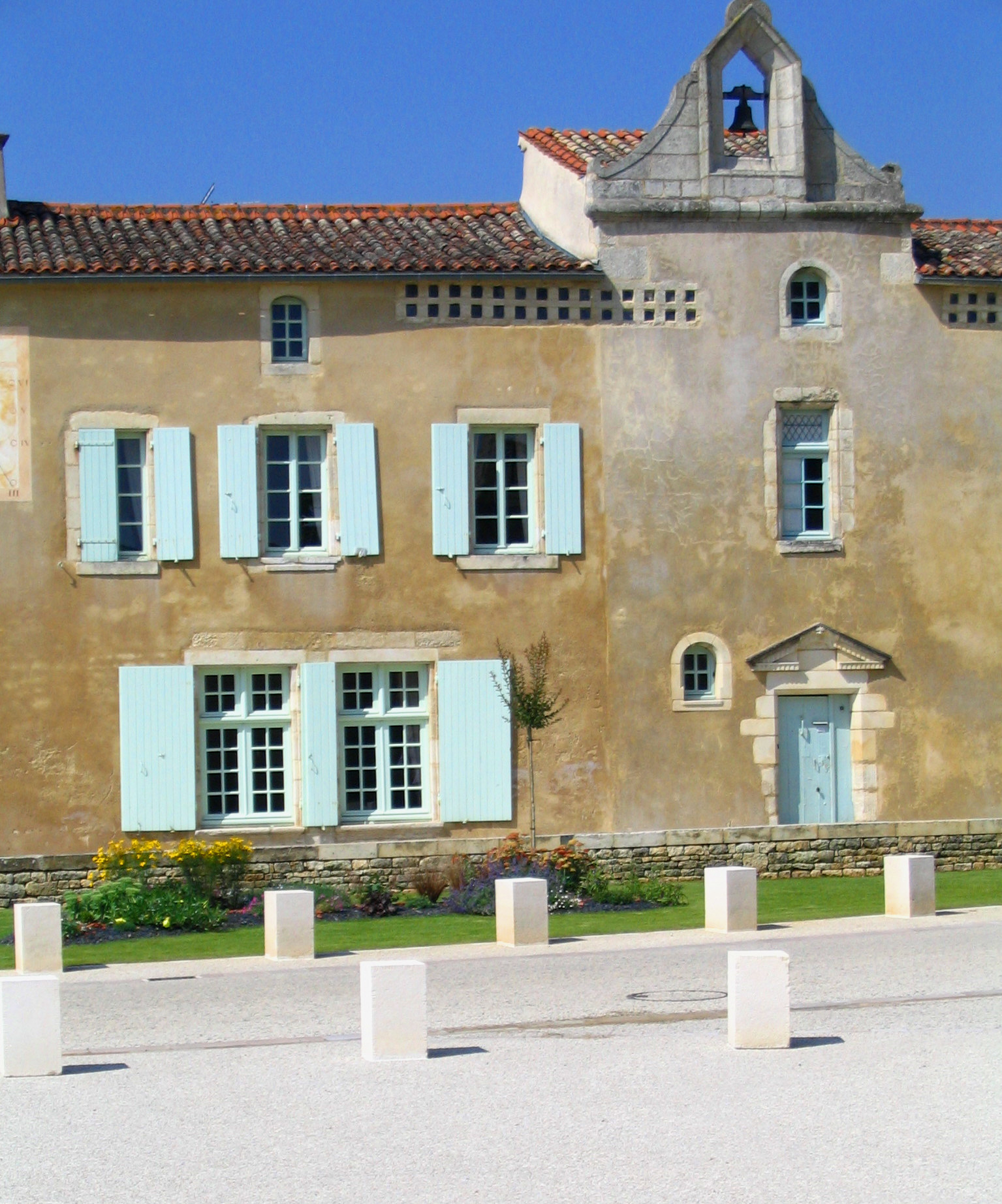 Maison sur la place de l'église - Nieul-sur-l'Autise, Vendée, France